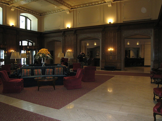 Fairmont Chateau Laurier